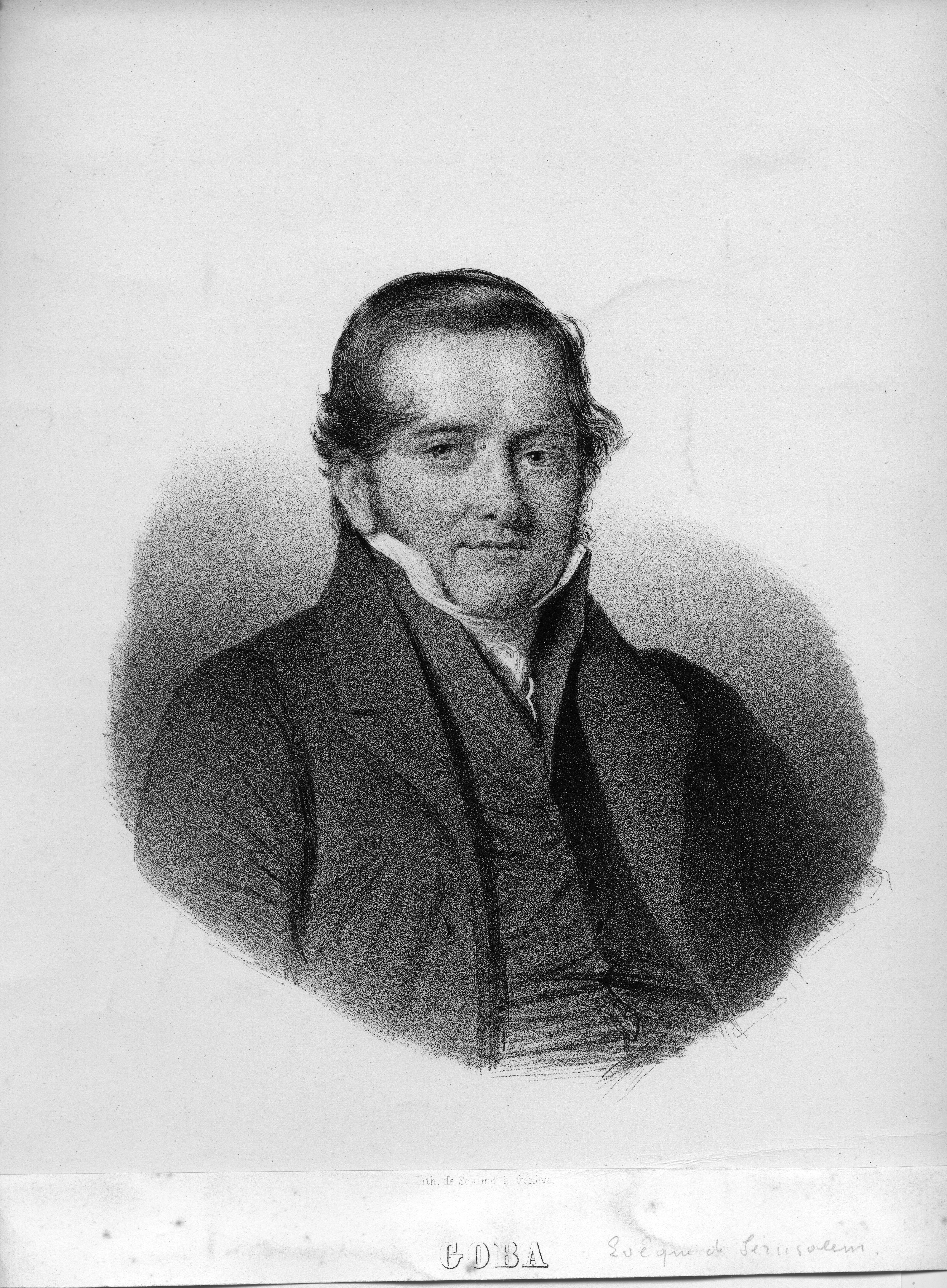 portrait gravé